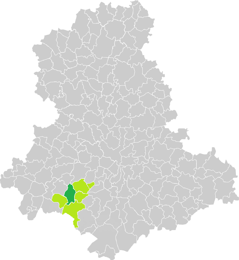 Carte de situation de la commune de Pageas (en vert foncé) dans le votre Canton (en vert clair) sur une carte des communes de la Haute-Vienne